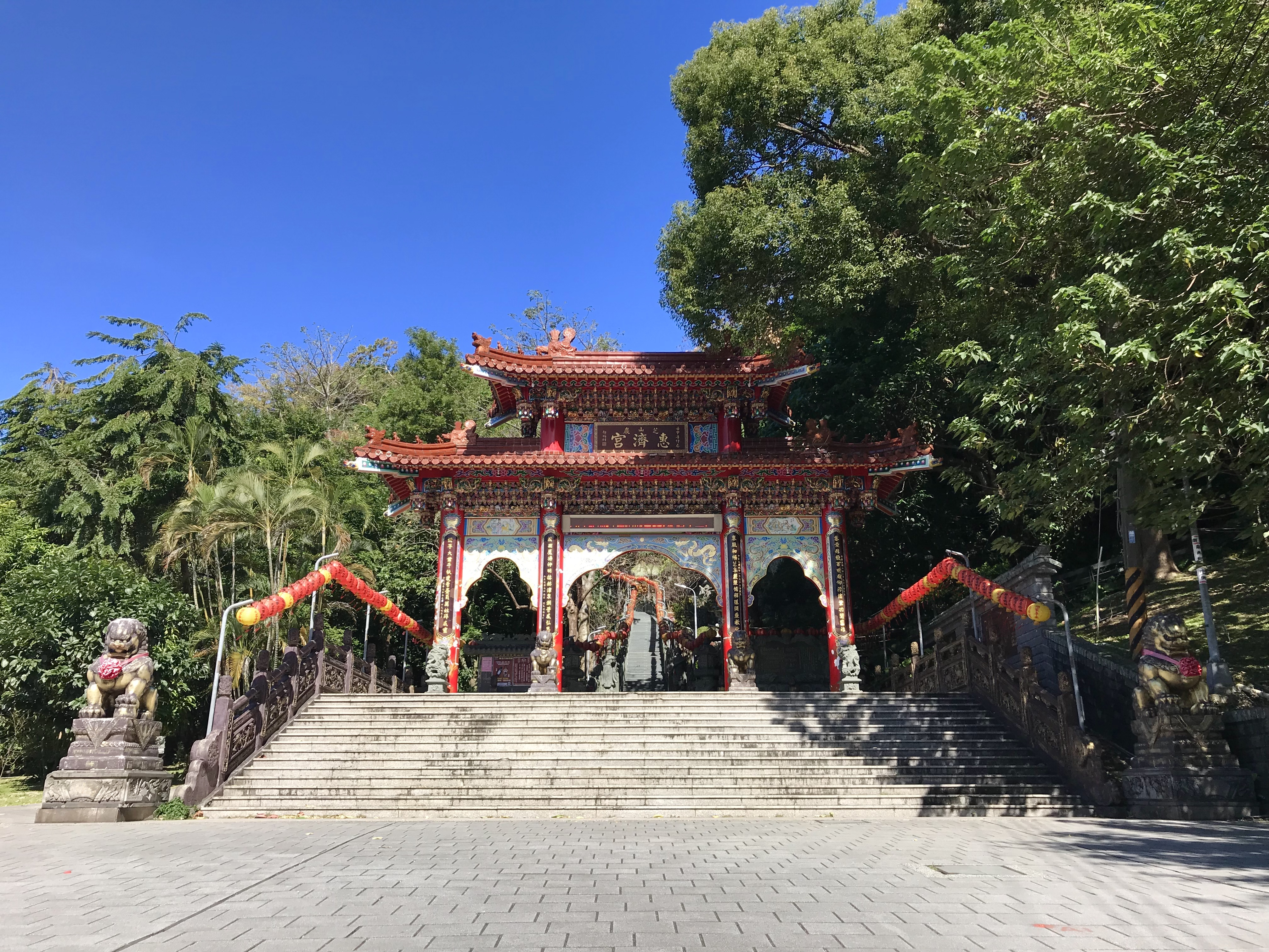 芝山巖惠濟宮入口